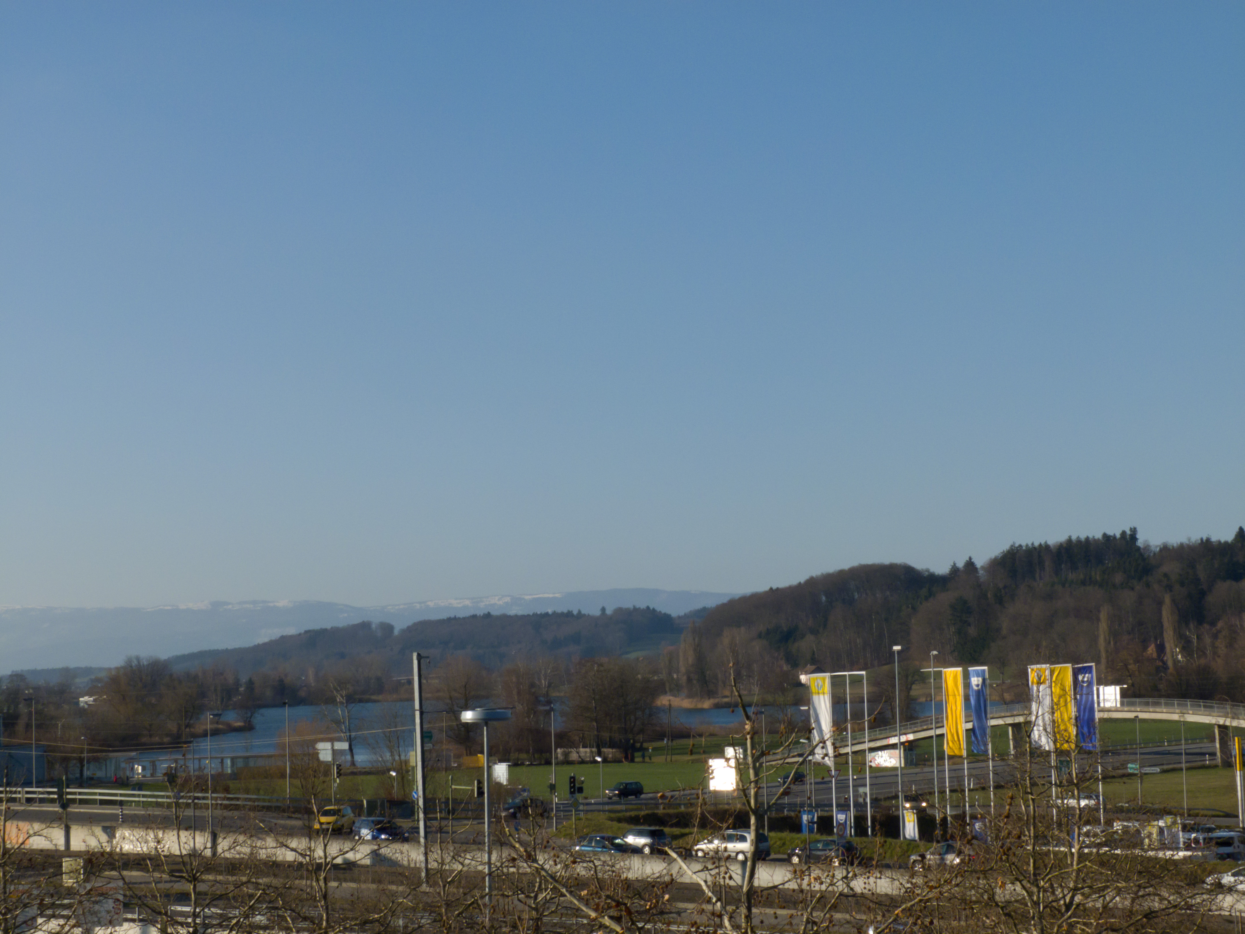 Mossee mit Umgebung